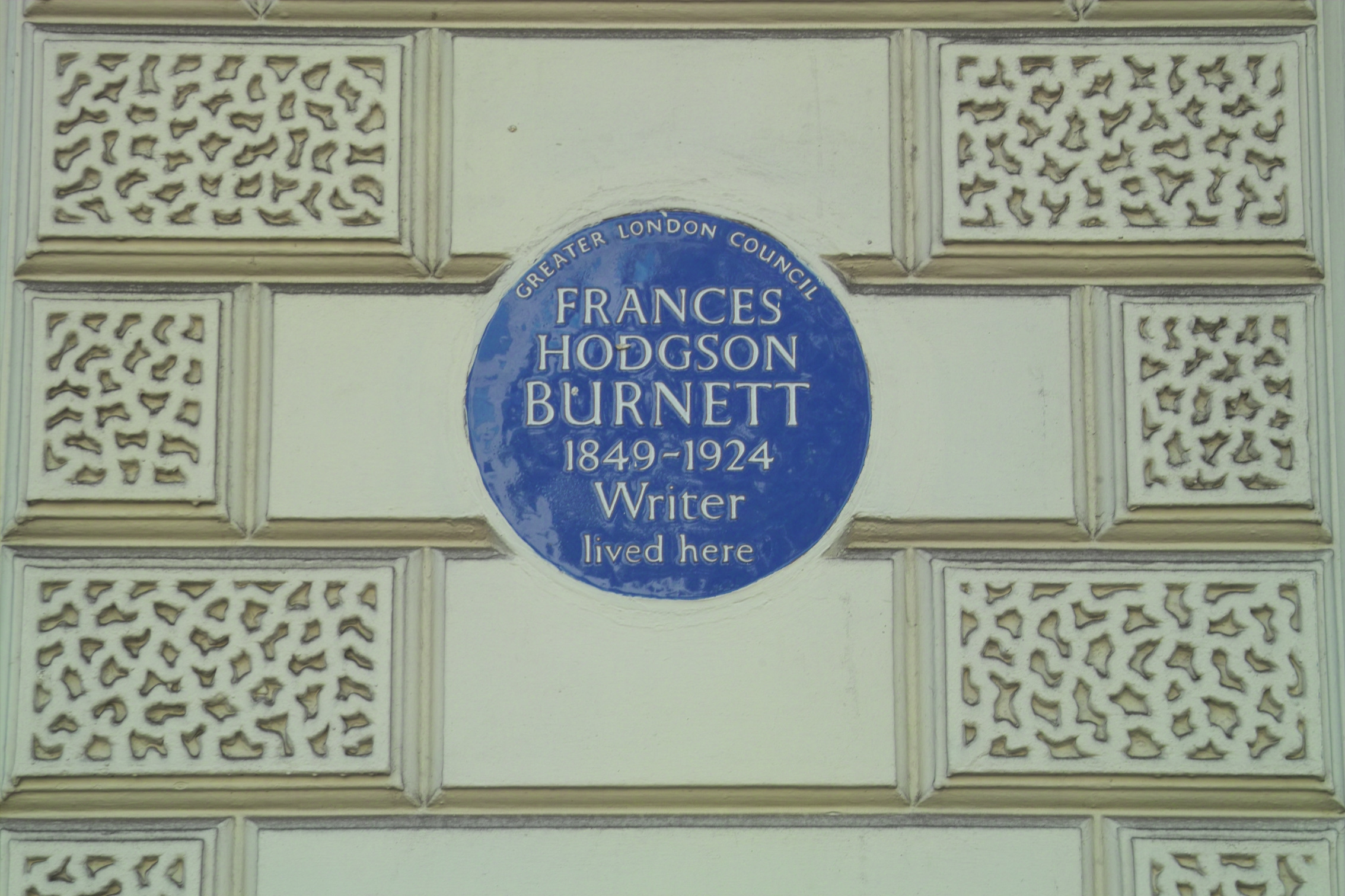 Taken by ed g2s • talk.